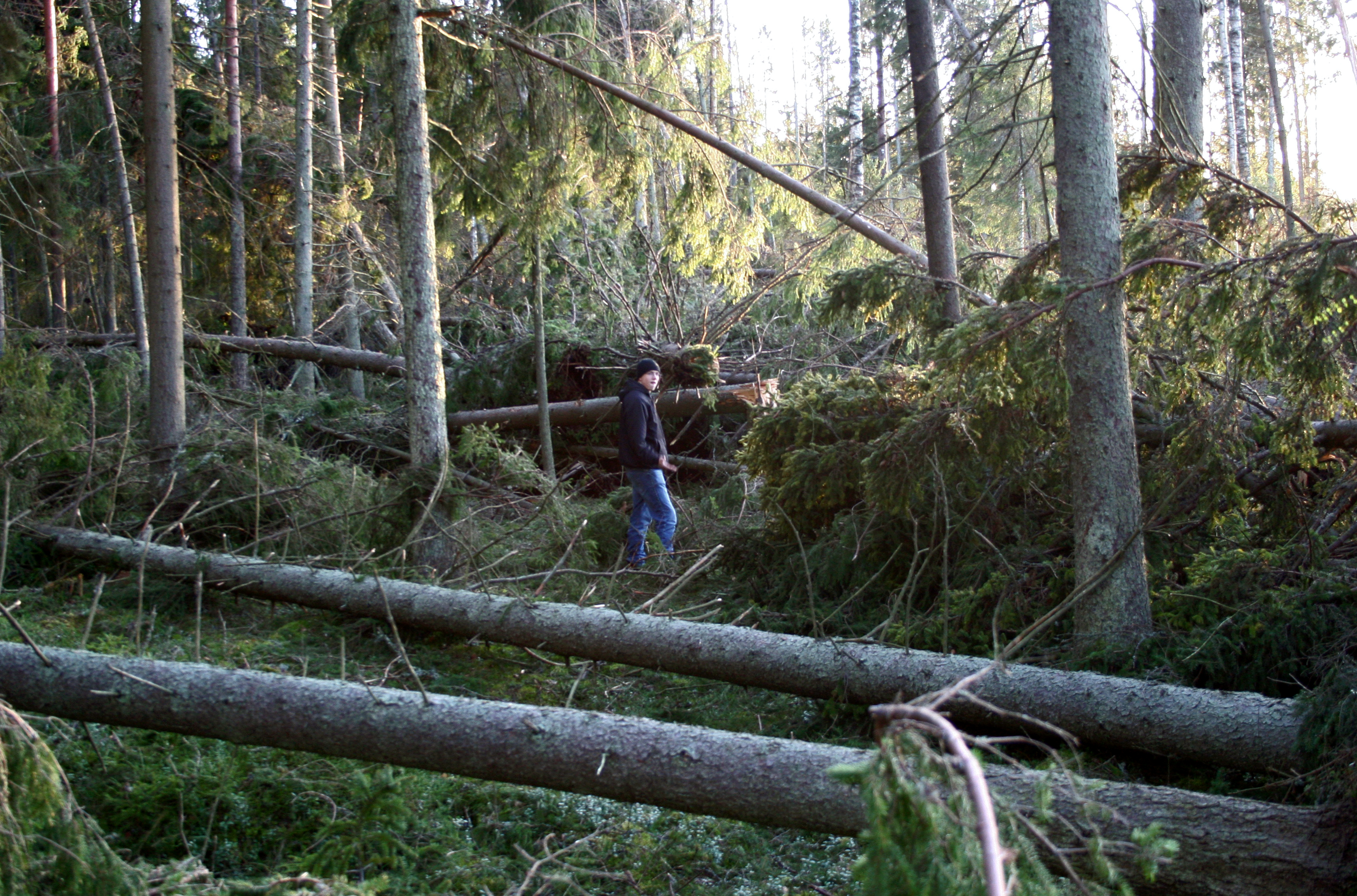 Syksyn 2011 myrskyn kaatamia puita, Kokemäki